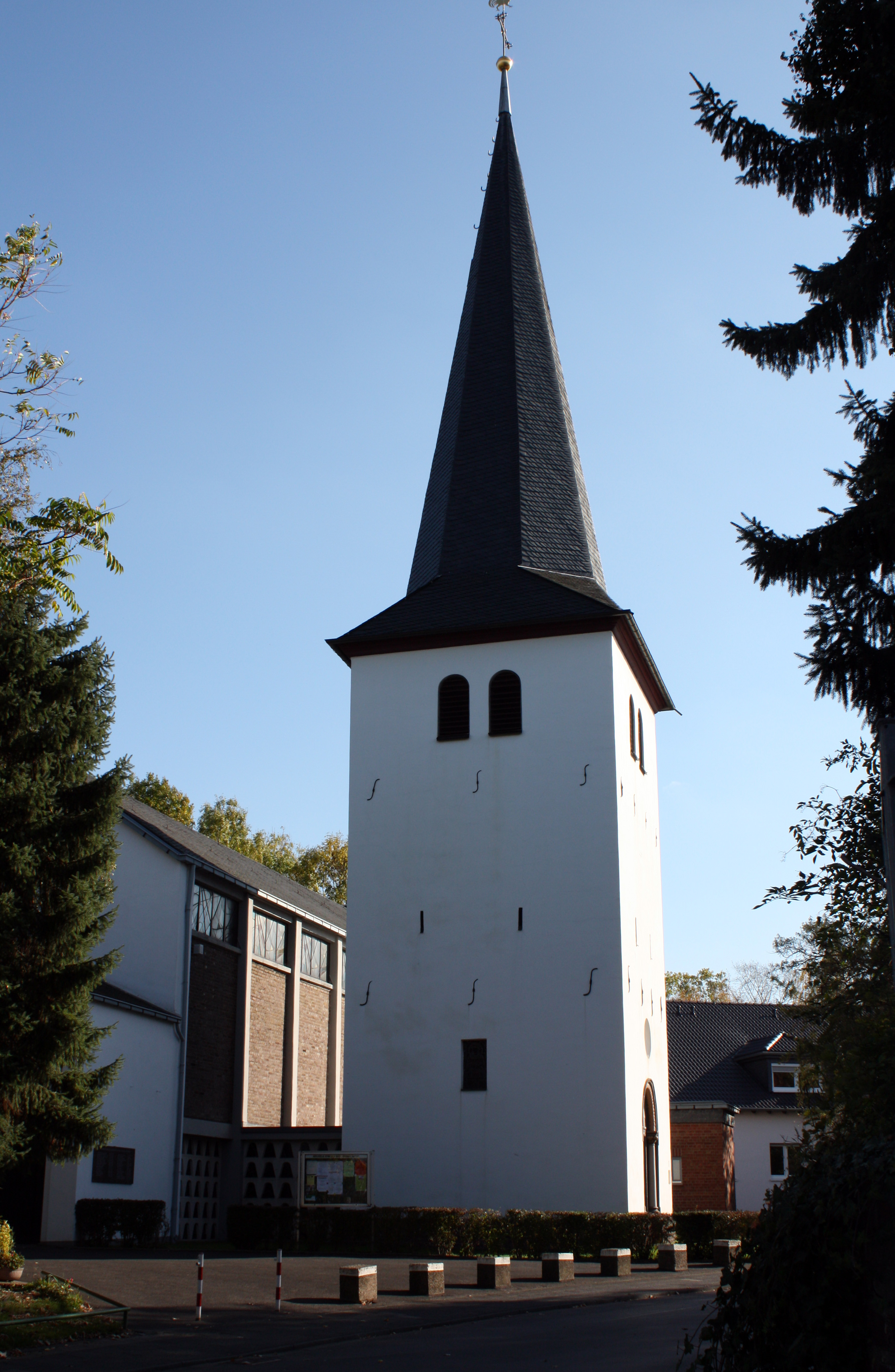 St. Johann Baptist, Kendenich